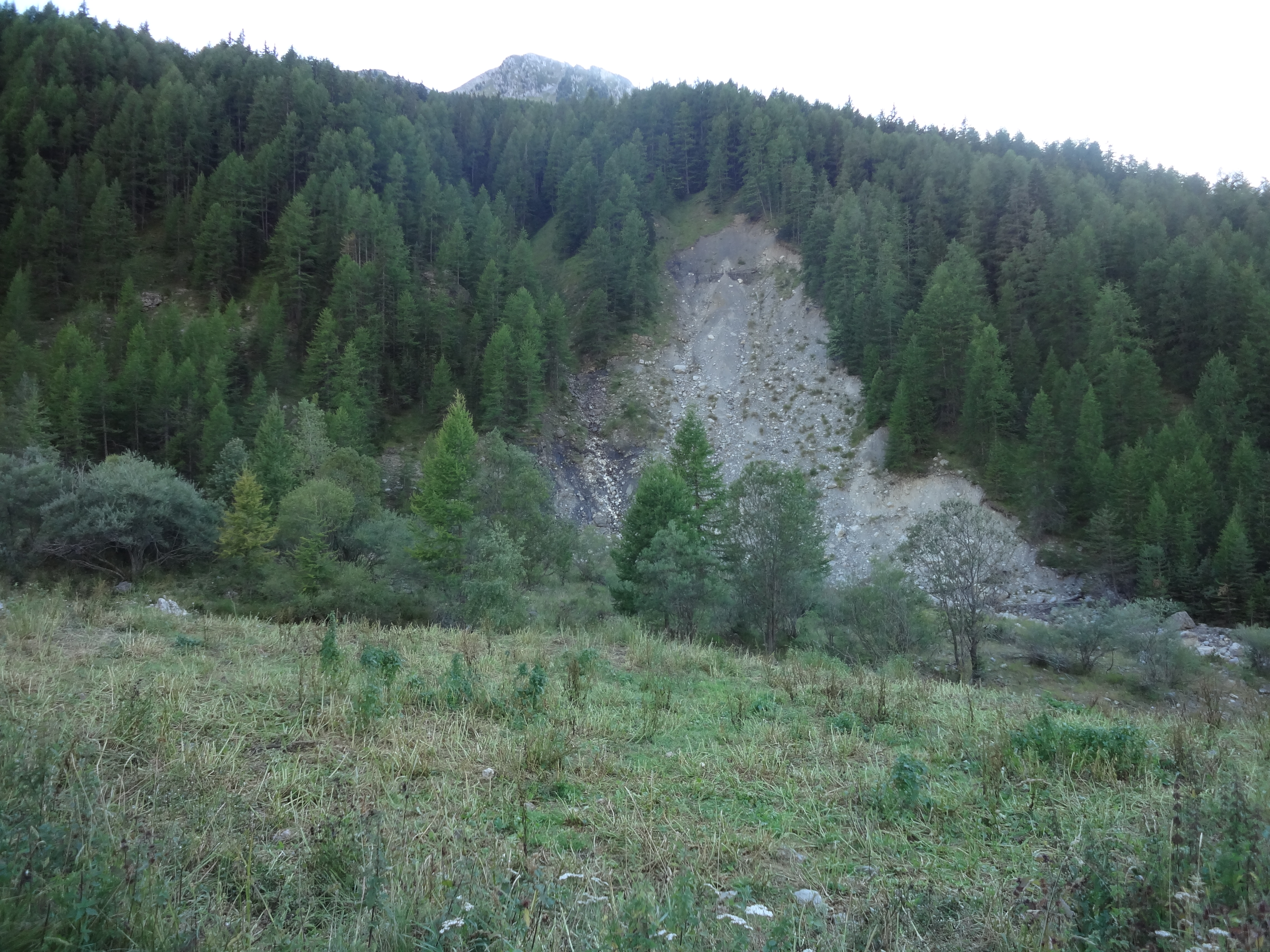 Dans le vallon de Laverq, commune de Méolans-Revel (Alpes-de-Haute-Provence).